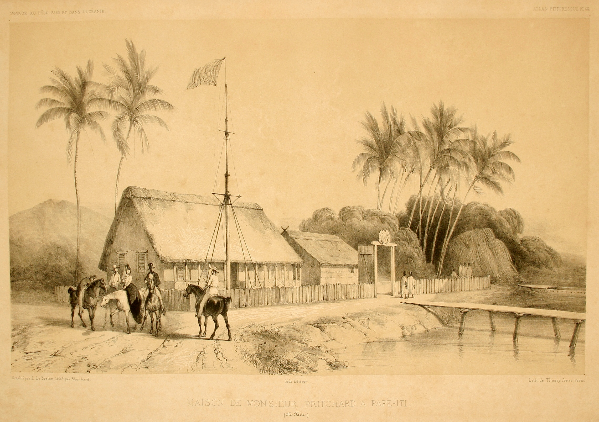 Maison de Monsieur Pritchard à Pape-Iti. Atlas pittoresque, planche 63